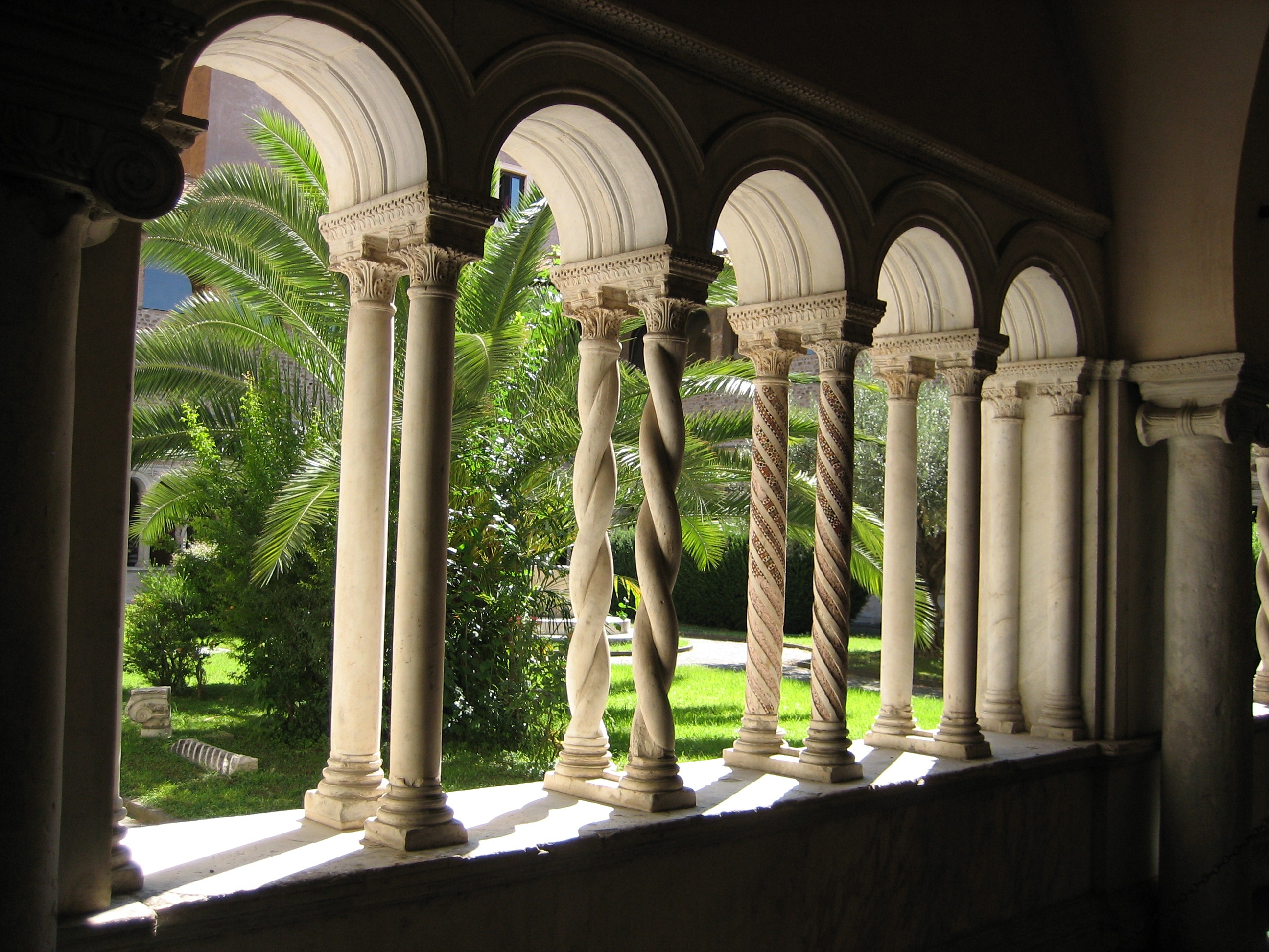 Rom_Lateran_Kreuzgang_01